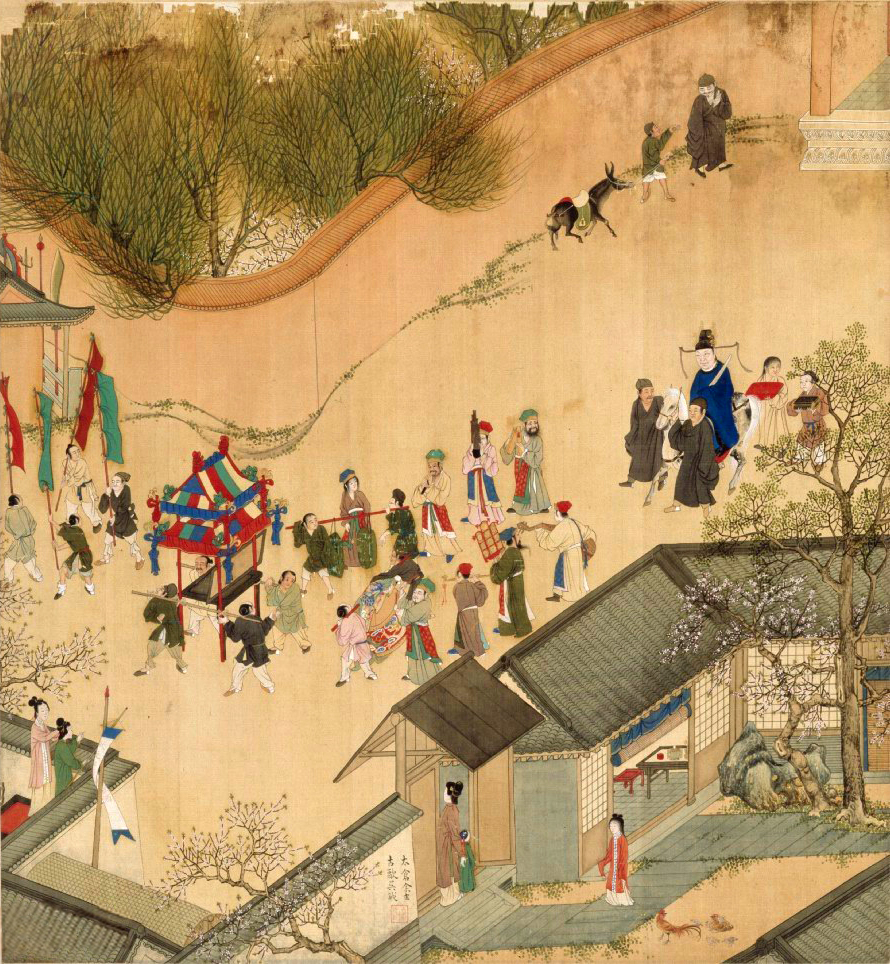 瓊林登第，時年三十二